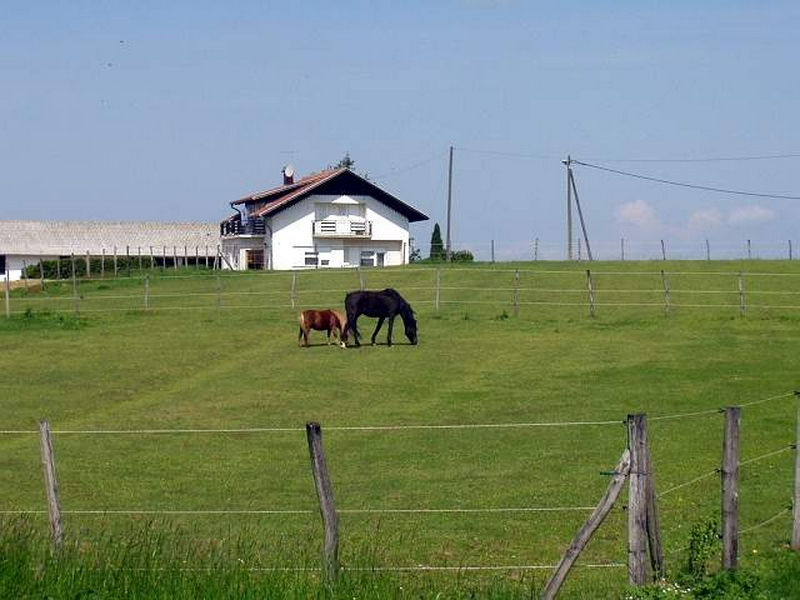 Lukovo - Horses